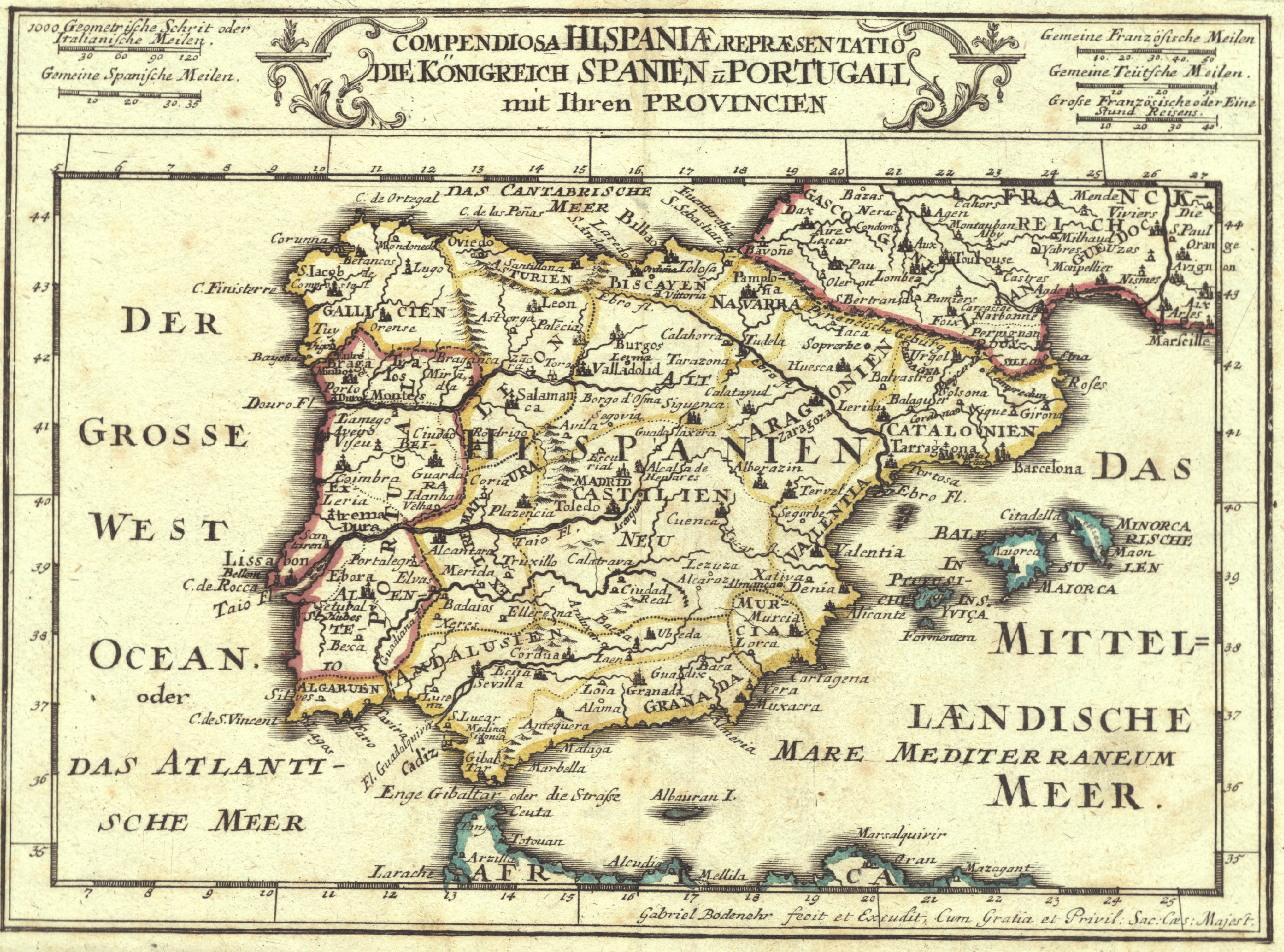 "Compendiosa Hispaniae representatio die konigreich Spanien und Portugall mit ihren provincien." Realizado en 1720 por Gabriel Bodenehr